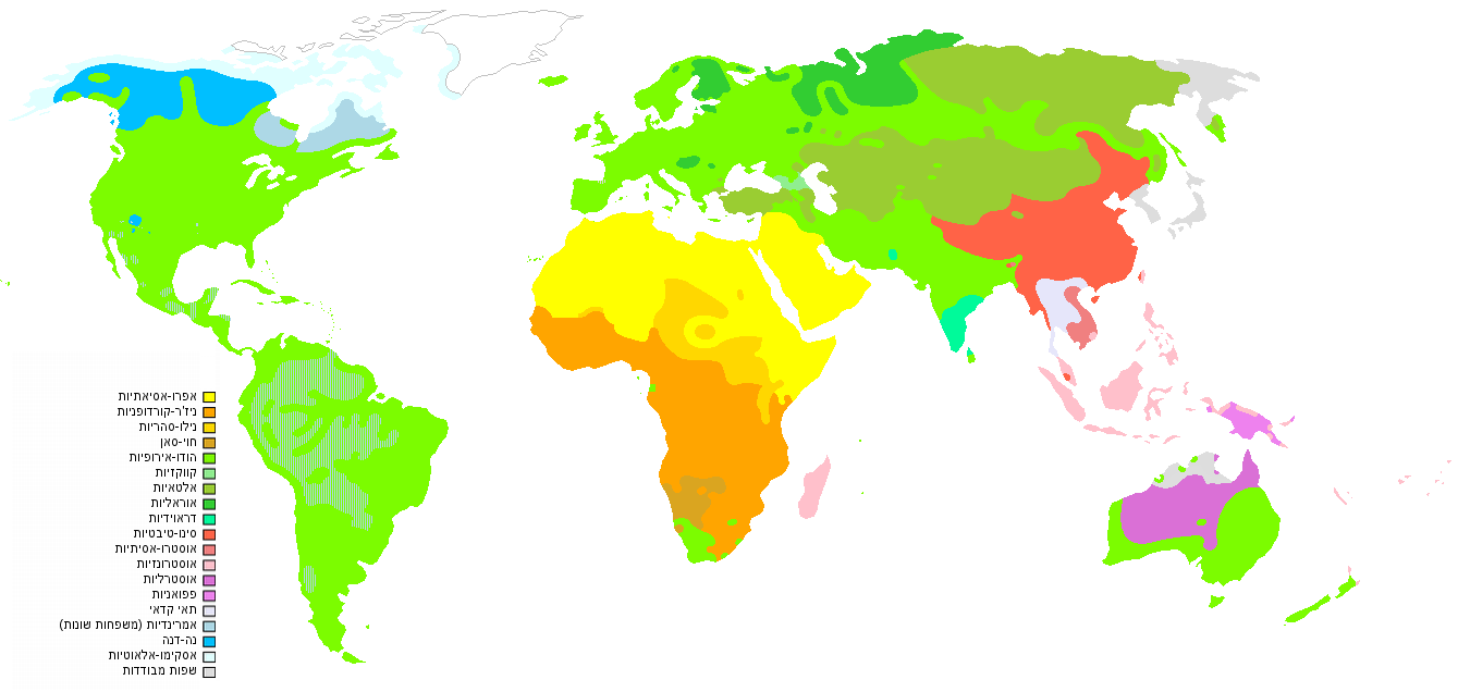 Human Language Families